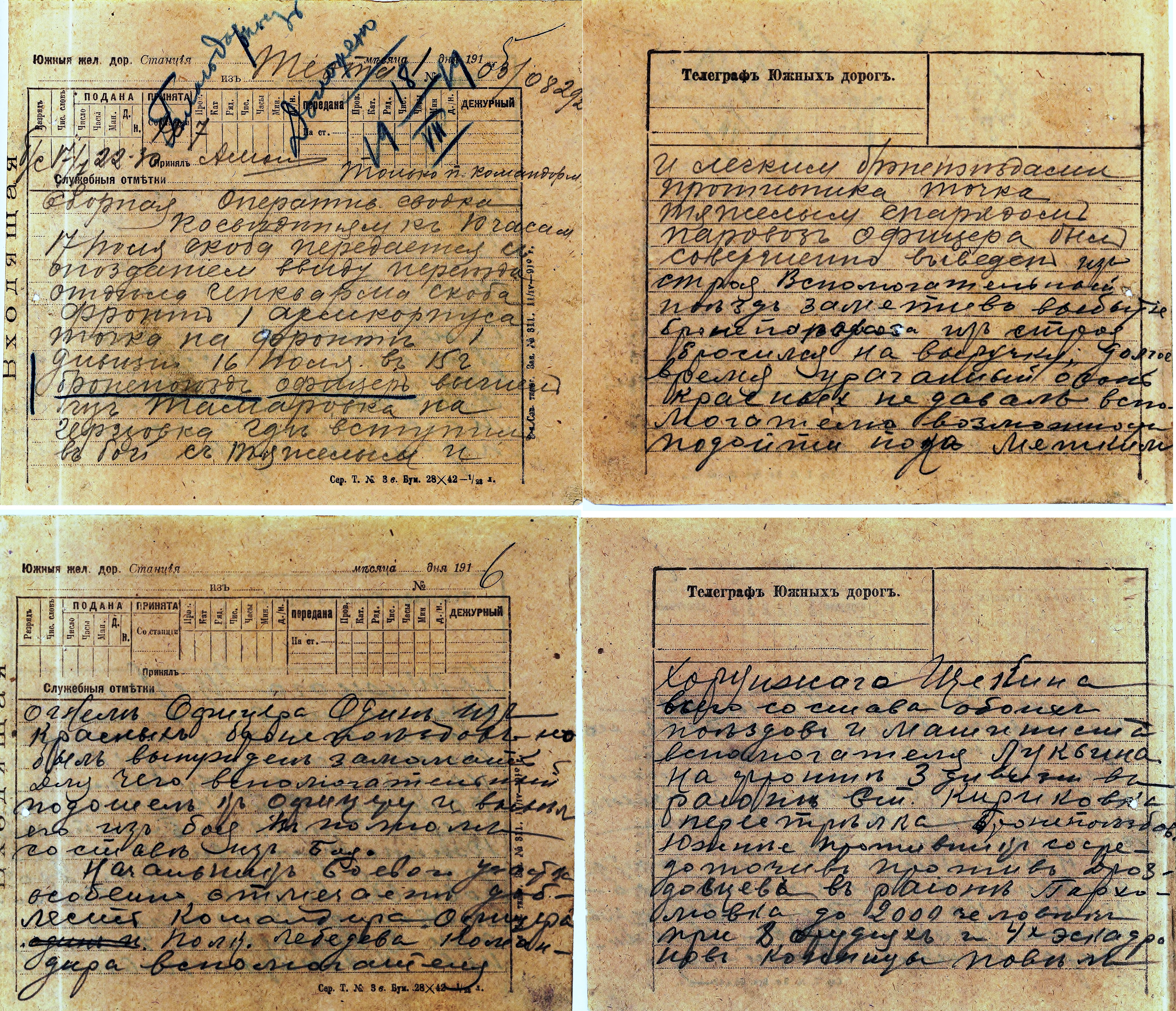 Фрагмент оперативной сводки 1-го армейского корпуса с описанием боя БЕПО "Офицер" 16.7.1919 у ст. Герцевка